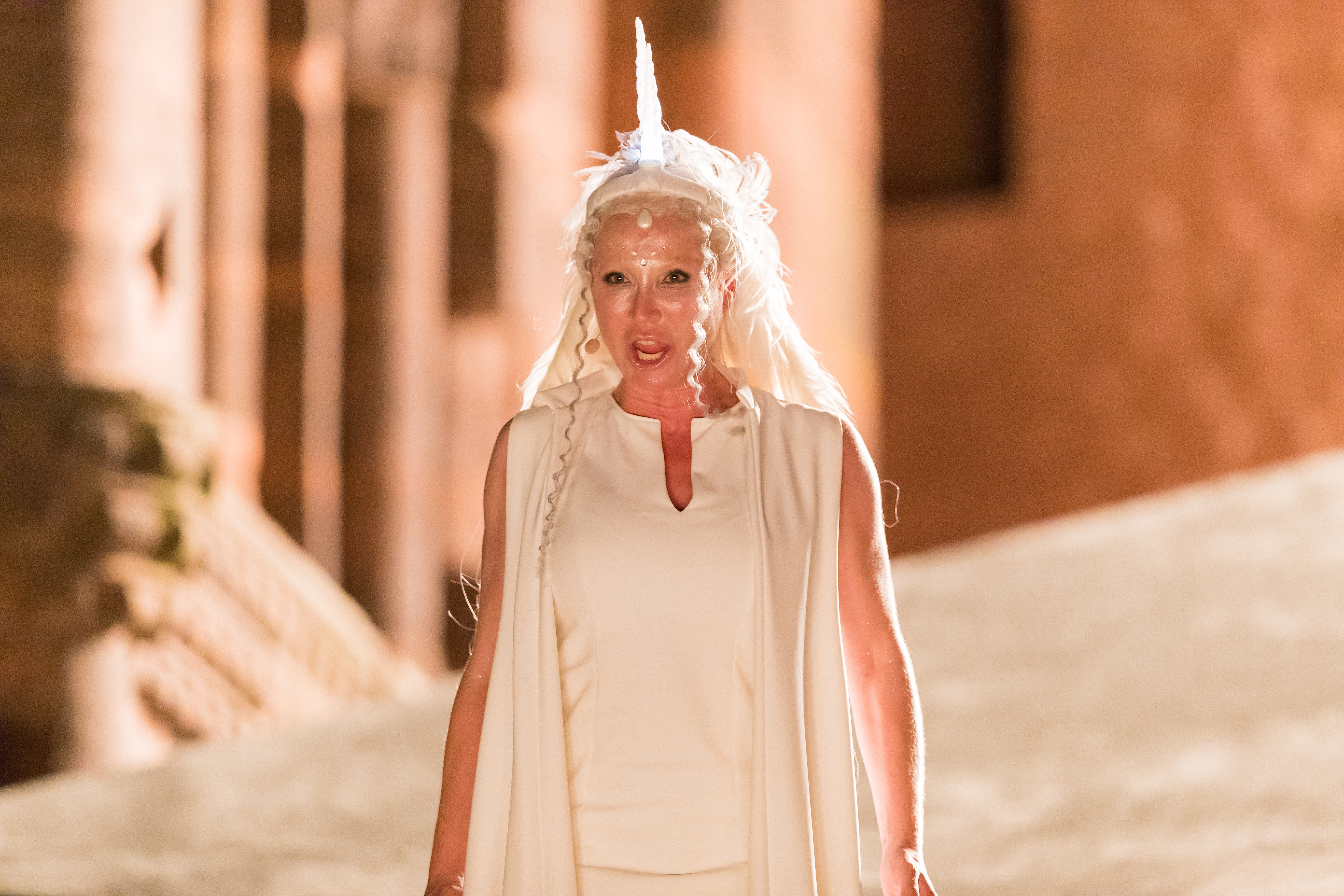 Nadja Michael during Nibelungenfestspiele "GLUT. Siegfried von Arabien." at Rheinland-Pfalz, Worms, , Germany on 2017-08-01, Photo: Sven Mandel